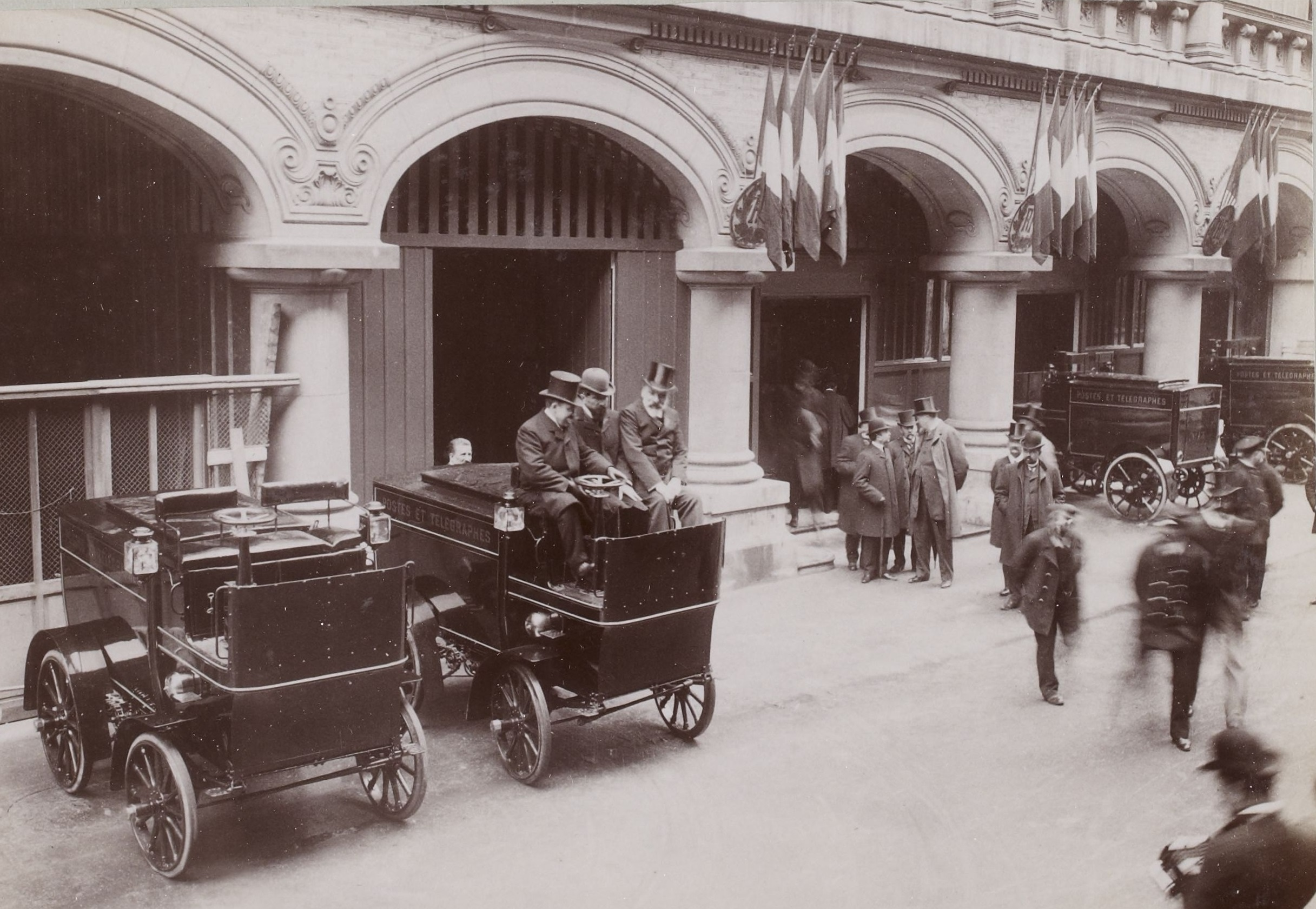 [Collection Jules Beau. Photographie sportive] : T. 28. AnnÃ©e 1904 / Jules Beau : F. 19v. Automobiles postales, tilburys et Ã©lectriques, 17 octobre 1904